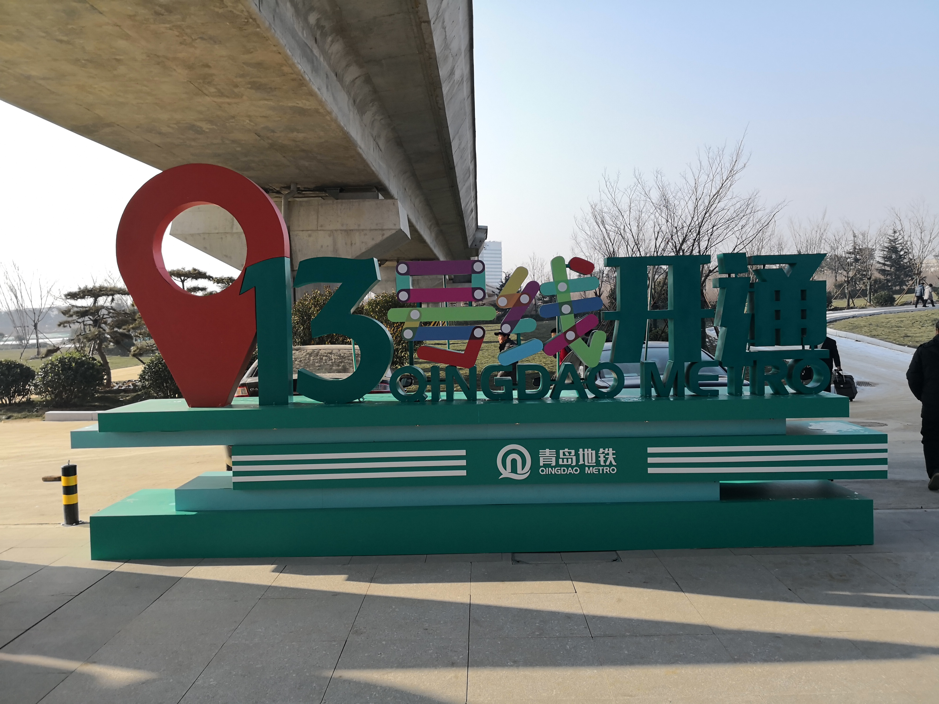 青岛地铁董家口火车站A出入口前的立牌